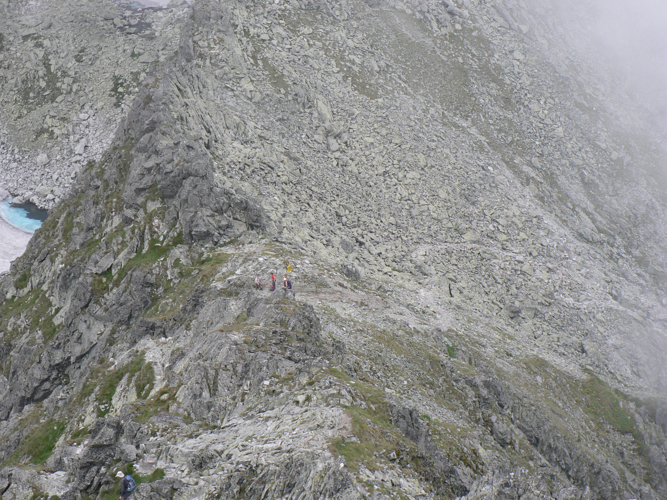 Polski Grzebień ze szlaku na Małą Wysoką. Po lewej jedno z Wielickich Ok